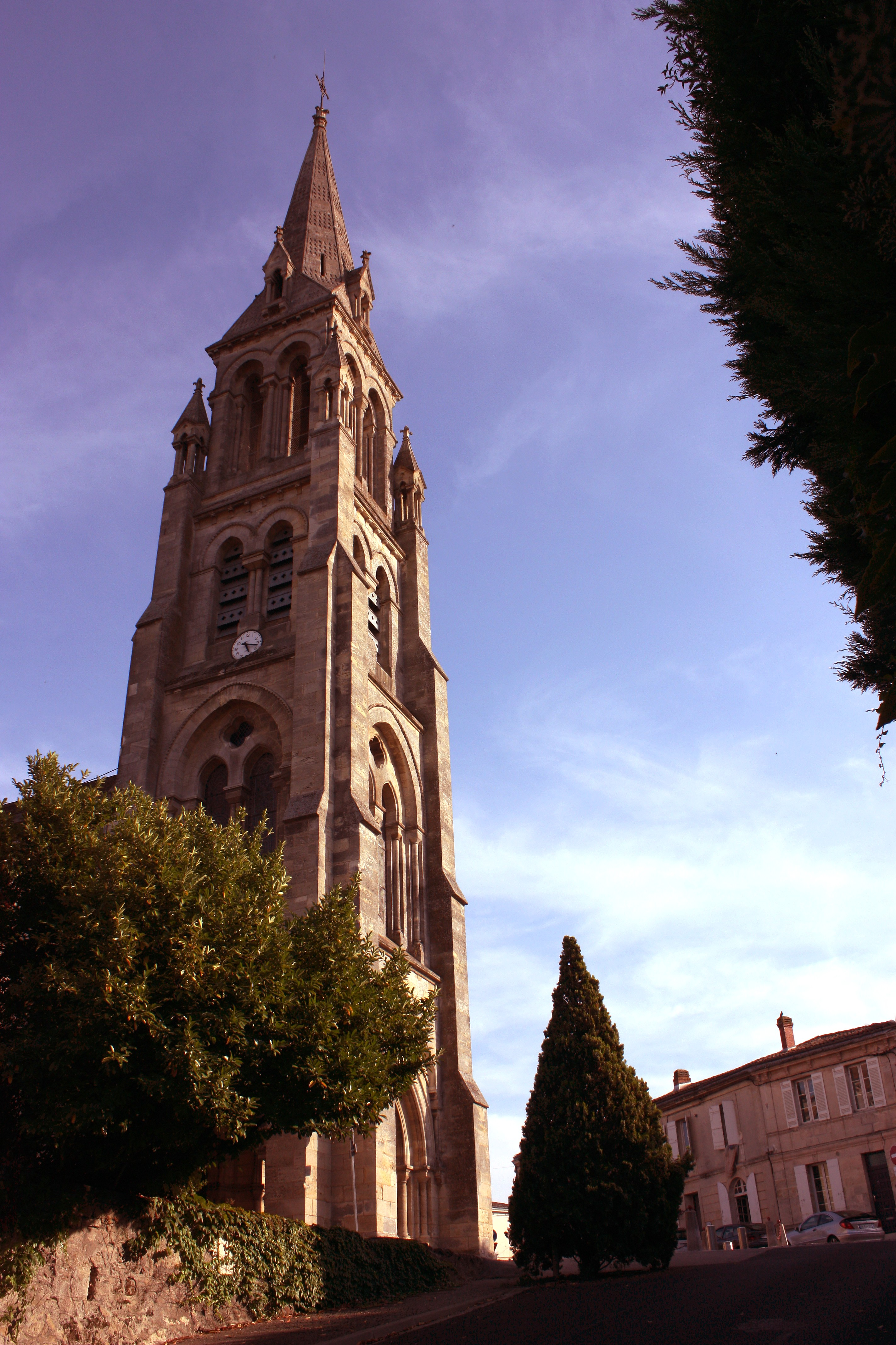 L'église de Bassens en Gironde .